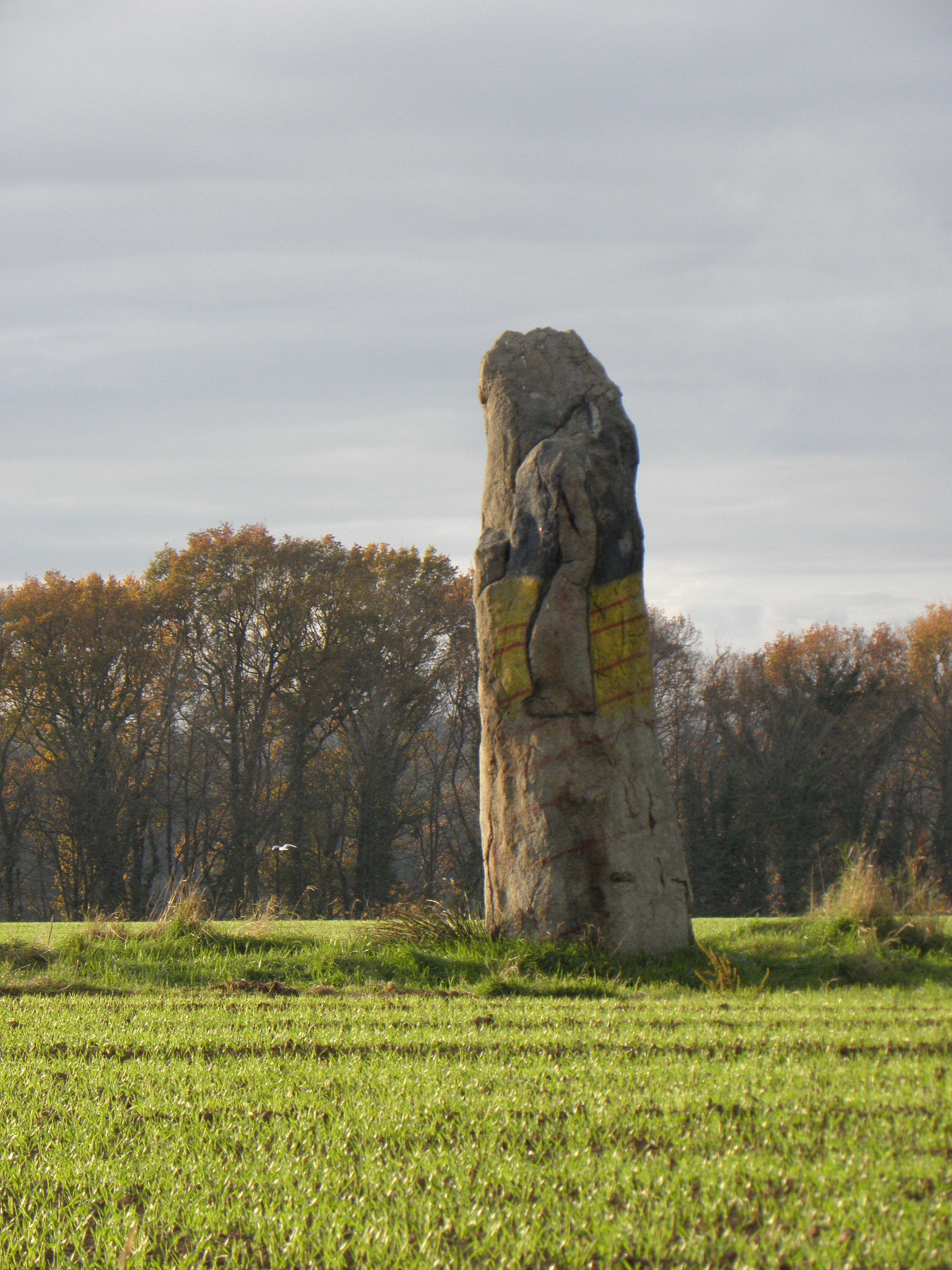 Menhir de la Pierre du Domaine en Plerguer (35).